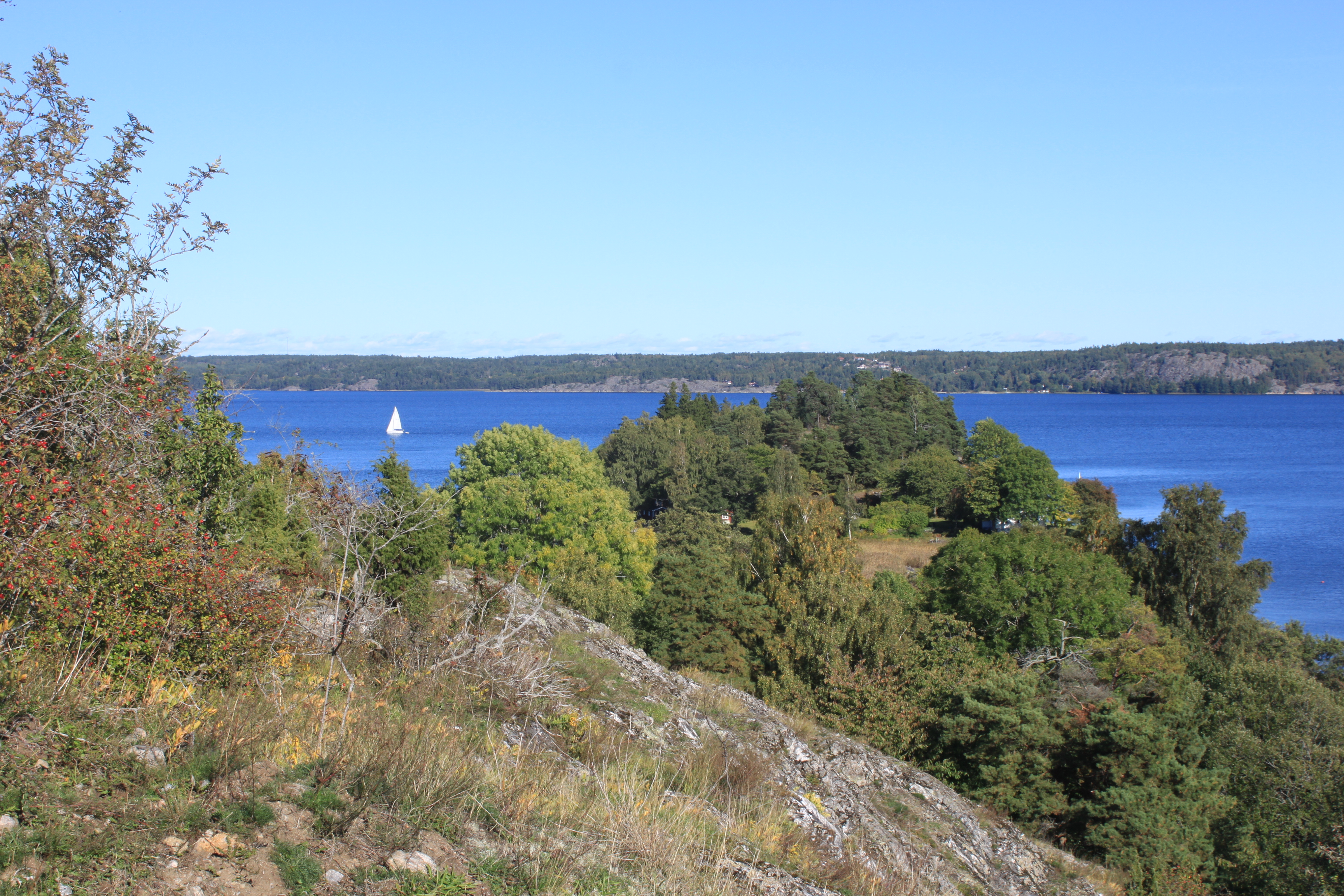 Uppe på Kalkbergets naturreservat, 24 September 2011.